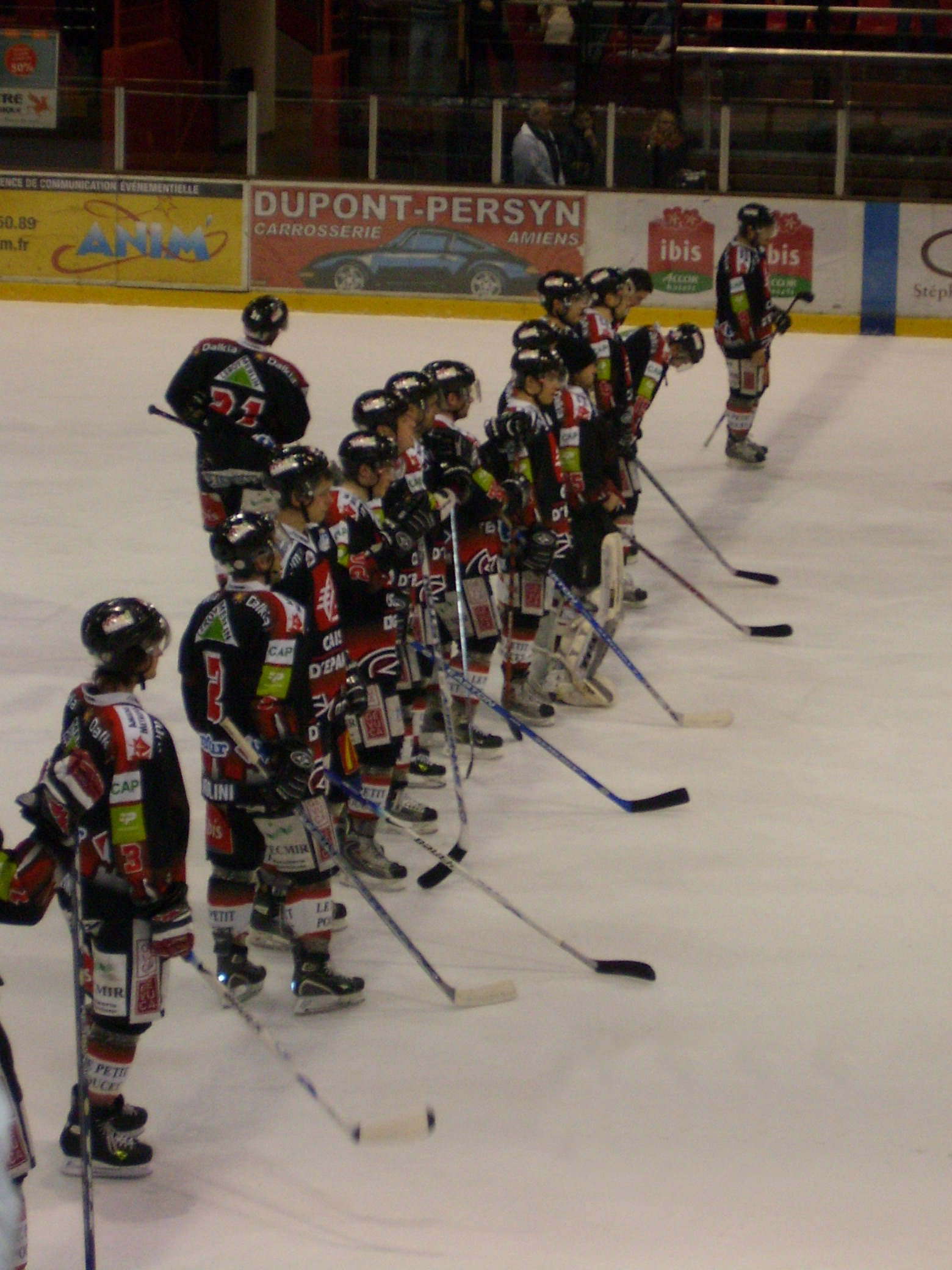 équipe des Gothiques d'Amiens, au cours du 3e match du 1er tour des play-off, Amiens